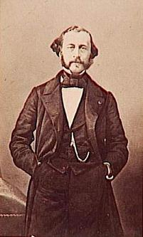 Portrait de Louis Arrighi de Casanova (1814-1888), sénateur du Second Empire.